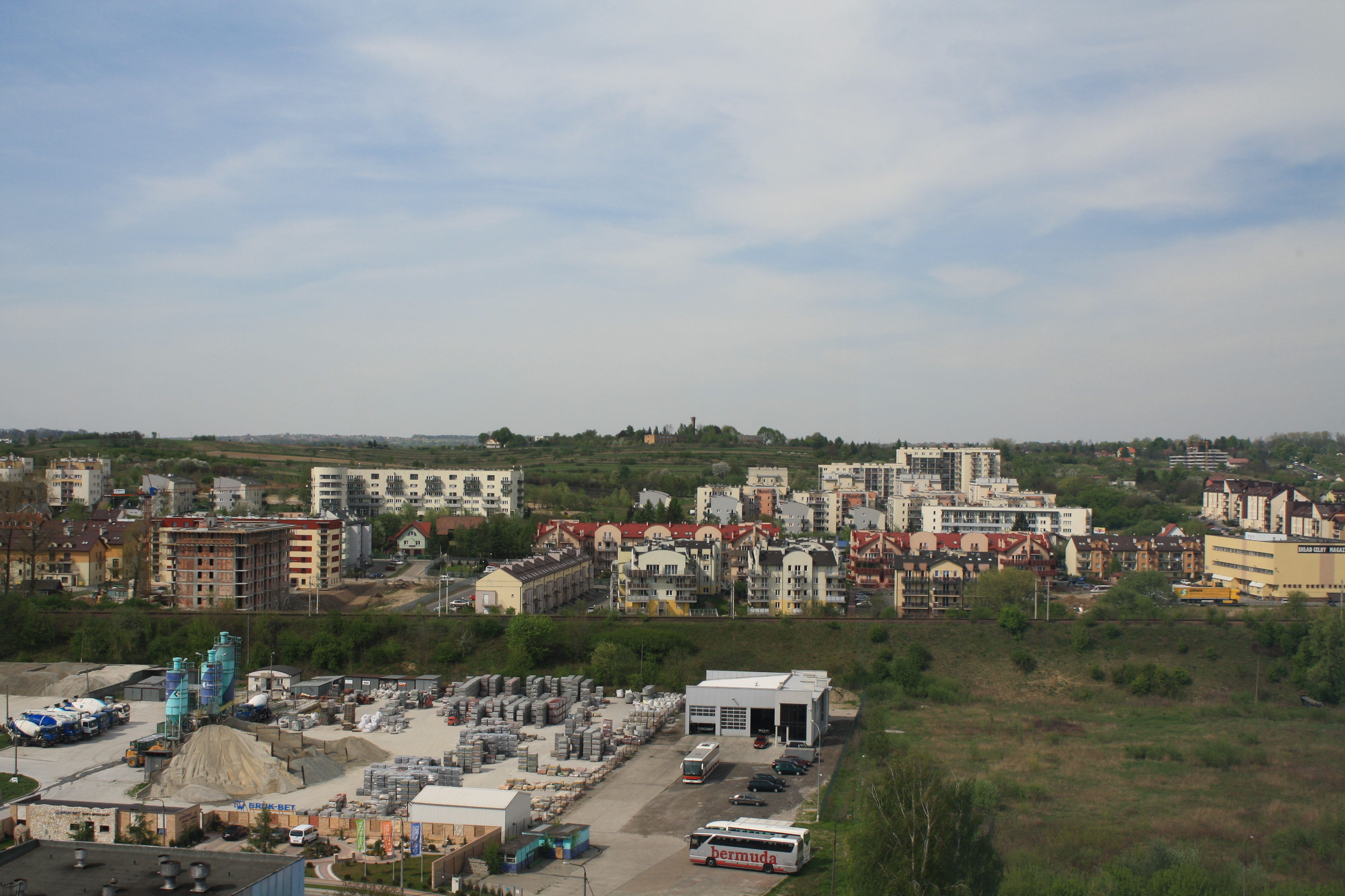 widok na osiedle Górka Narodowa